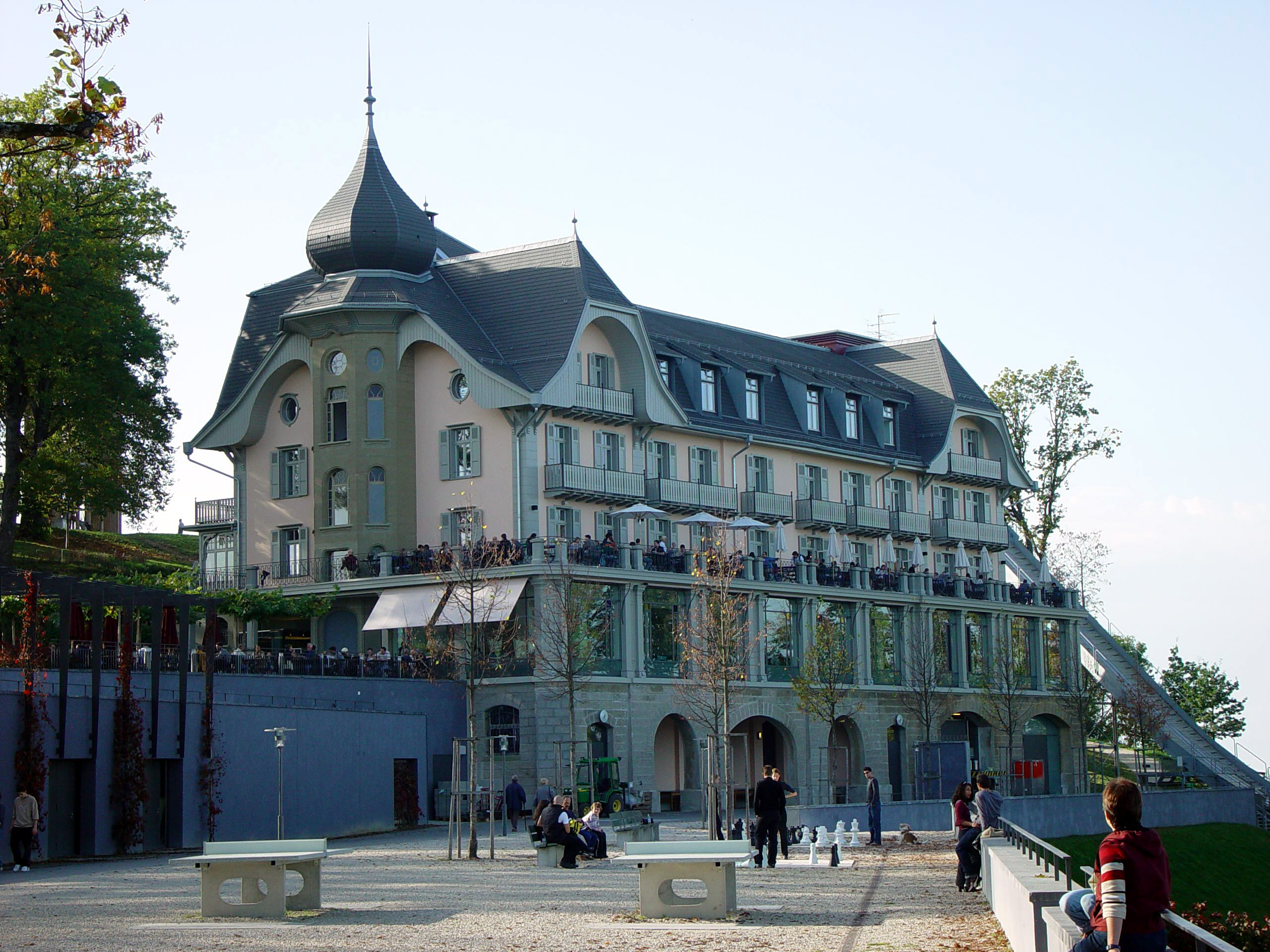 Gurten, Bern, Switzerland